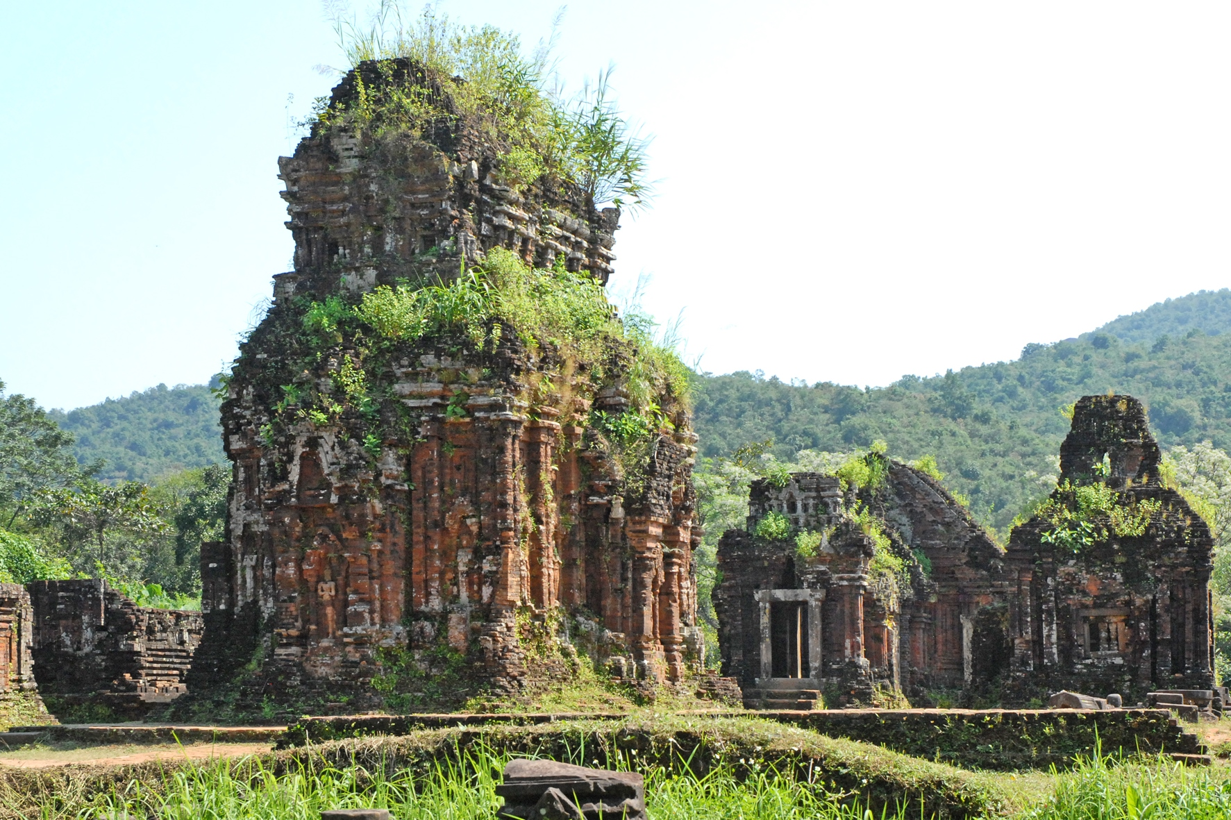 Le sanctuaire principal (kalan) - groupes B, C, D Au premier plan, l'édifice C1 Le sanctuaire C1, du VIIIème siècle, était dédié à Shiva, représenté sous forme de linga. Le temple Cham ou Kalan est probablement une représentation symbolique de Sikhara, le sommet de la montagne sacrée des Cham, appelé mont Meru dans le brahmanisme. Le mont Meru est la montagne mythique considérée comme l'axe du monde dans la mythologie hindoue.